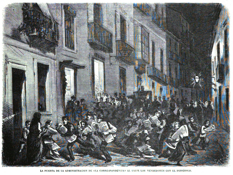 La puerta de la administración de "La Correspondencia" al salir los vendedores con el periódico. Calle del Rubio n° 23